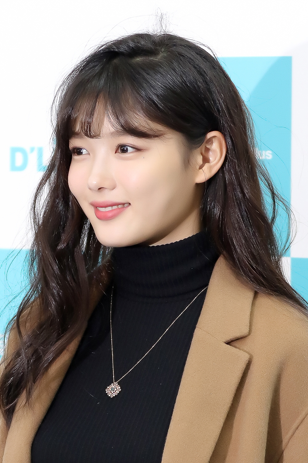 161112 김유정 팬싸인회